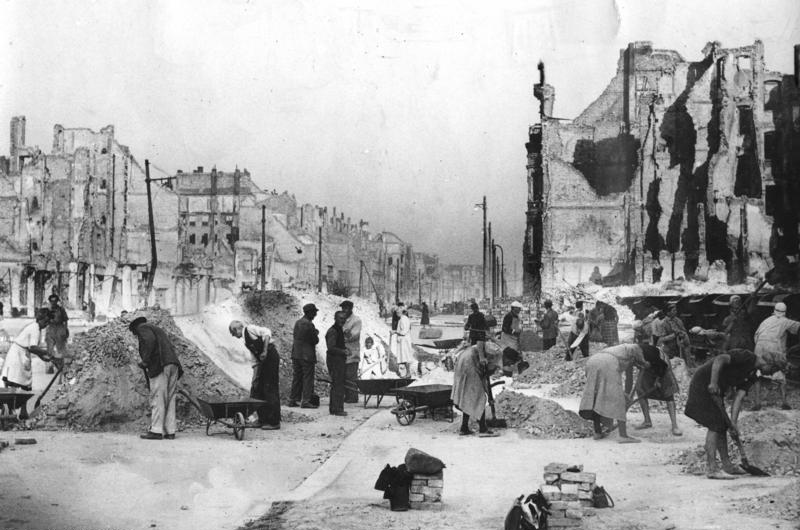 Berlin, Frankfurter Allee, Aufräumungsarbeiten ADN-ZB/Archiv Berlin Aufräumarbeiten in der im II. Weltkrieg zerstörten Frankfurter Allee Aufn. August 1946